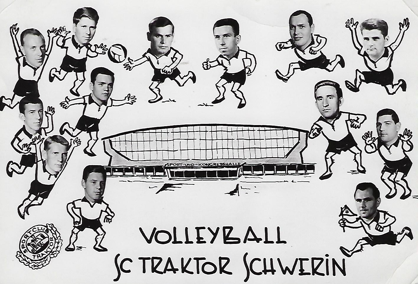 Volleyball-Mannschaft des SC Traktor Schwerin mit Trainer als FDGB-Pokalsieger in der DDR